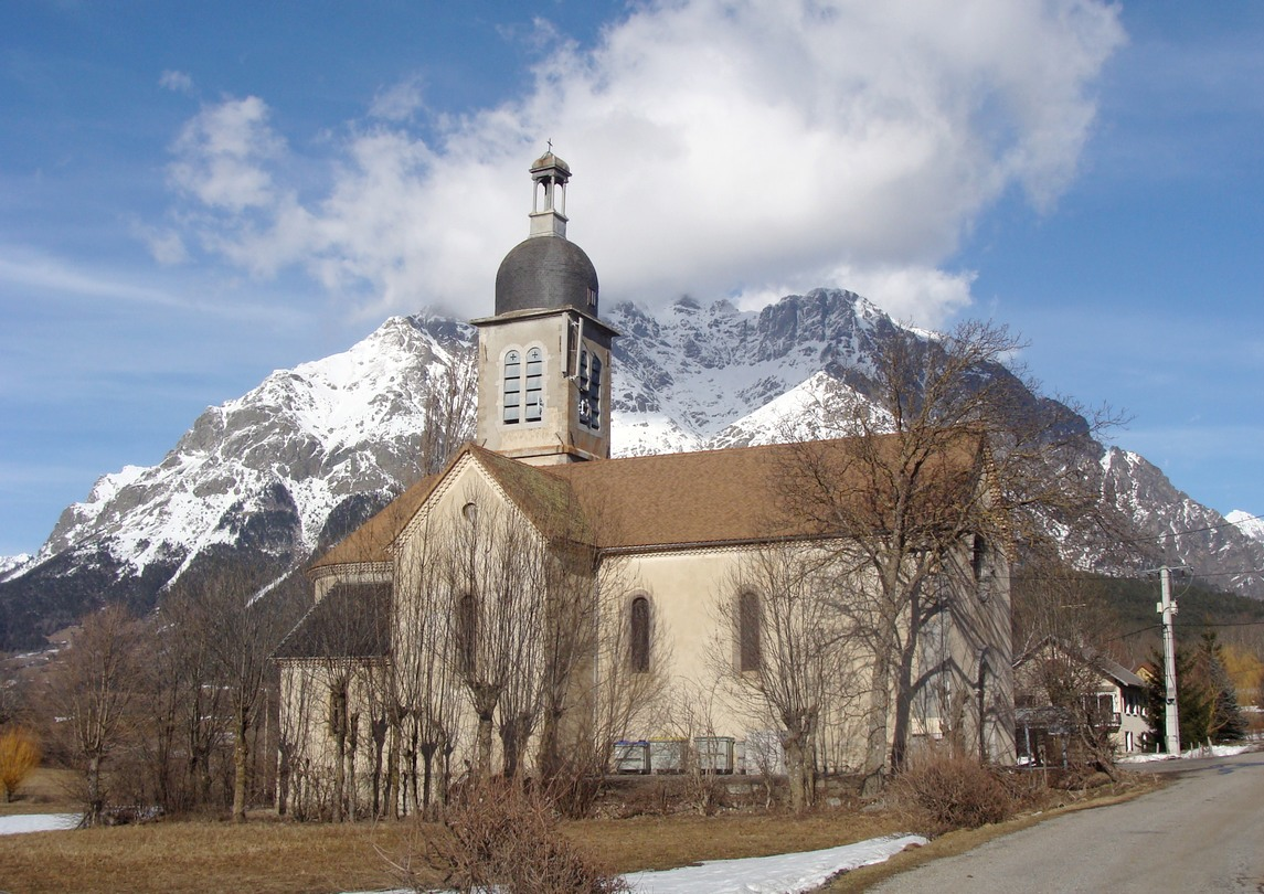 L'église de Saint-Eusèbe-en-Champsaur (Hautes-Alpes). En arrière-plan, le massif du Petit-Chaillol, partie du massif des Ecrins.